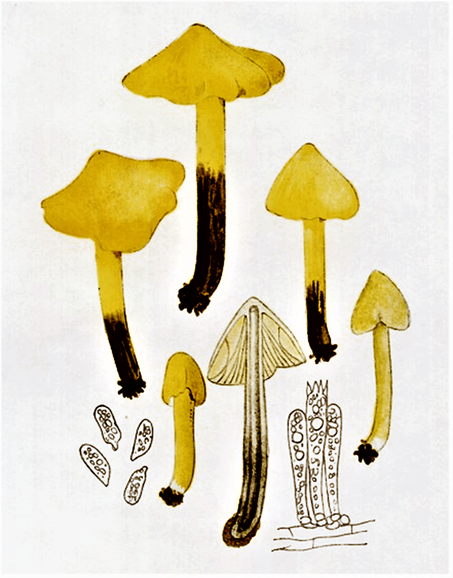 Giacomo Bresadola: Hygrophorus tristis Bres., heute Hygrocybe conica Schaeff., 1774) P.Kumm. (1871)